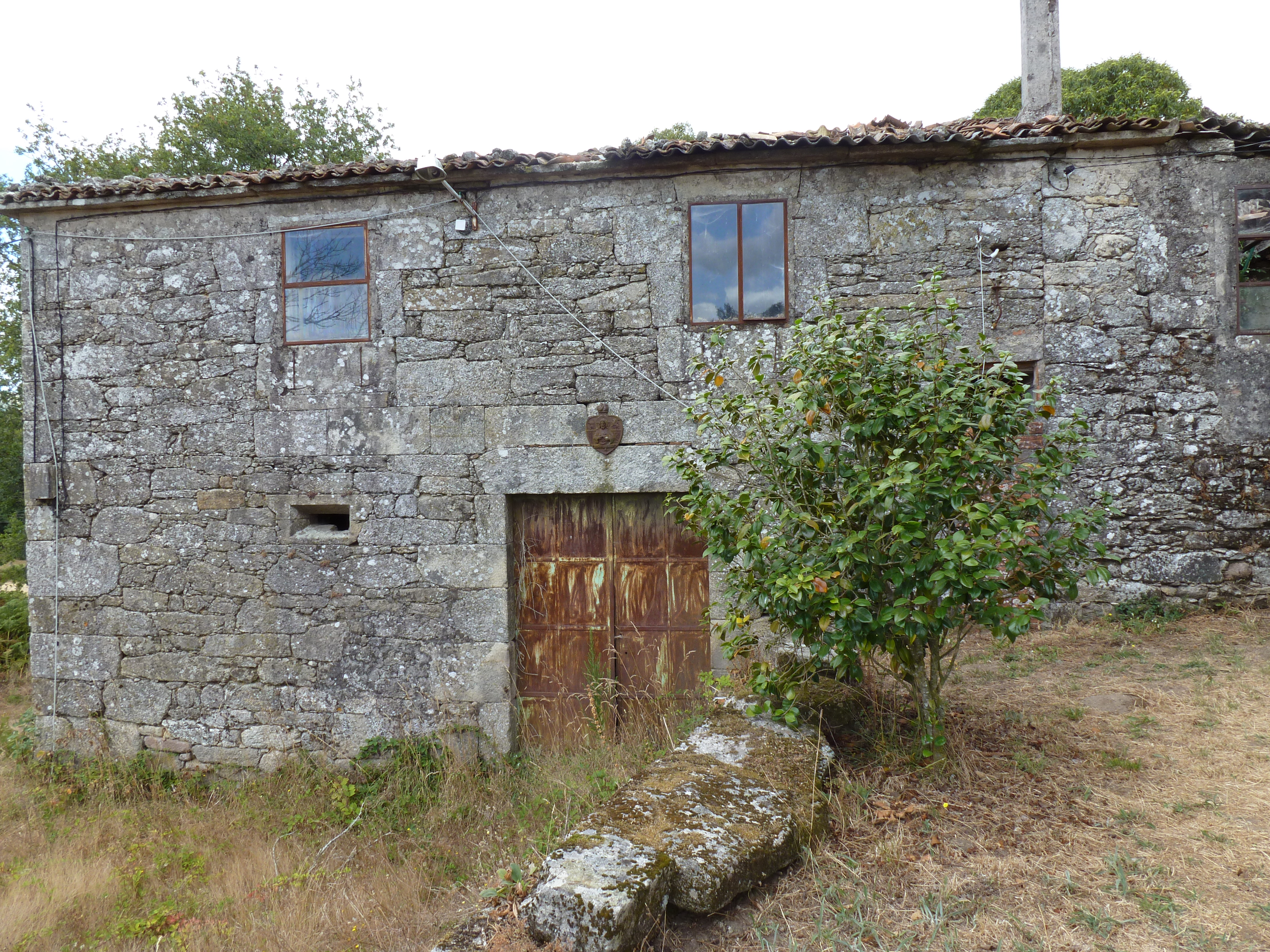 Reitoral de Santo Estevo de Cartelos, Cartelos, concello de Carballedo, Lugo